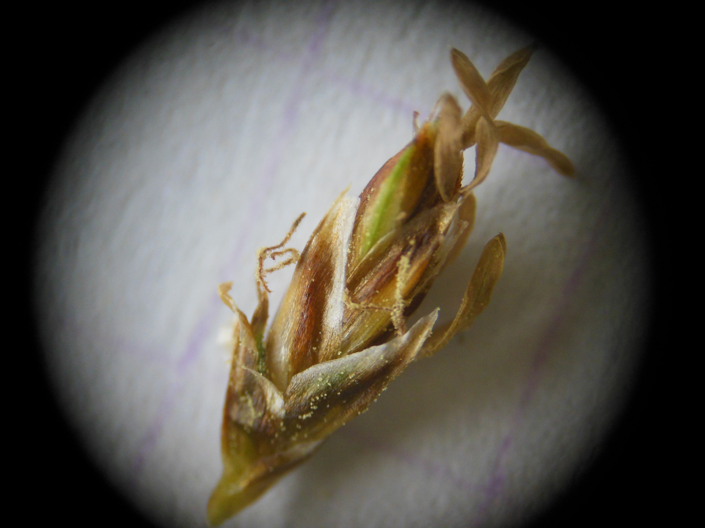 Carex paniculata